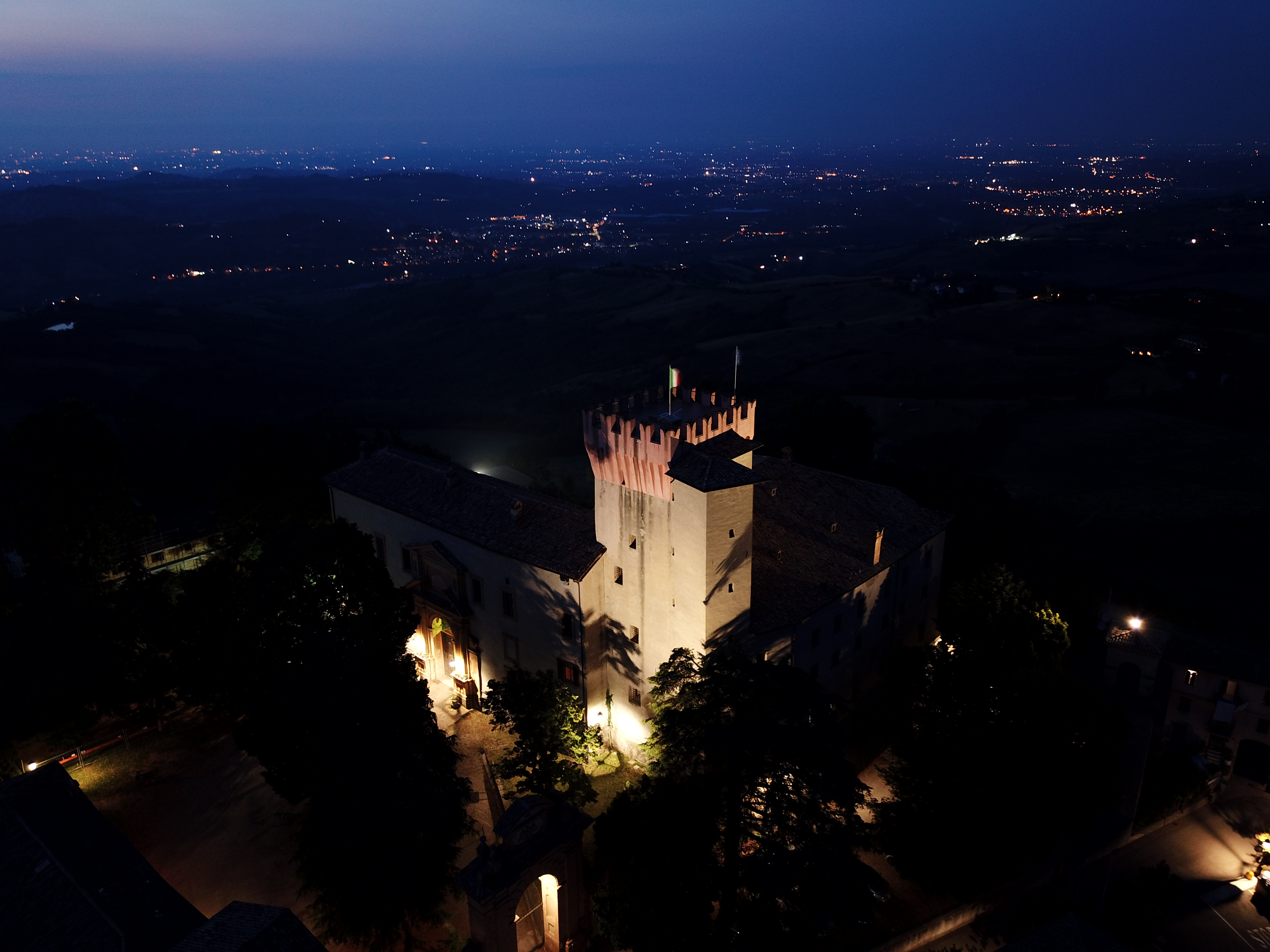 Complesso del Castello di Guiglia This is a photo of a monument which is part of cultural heritage of Italy.